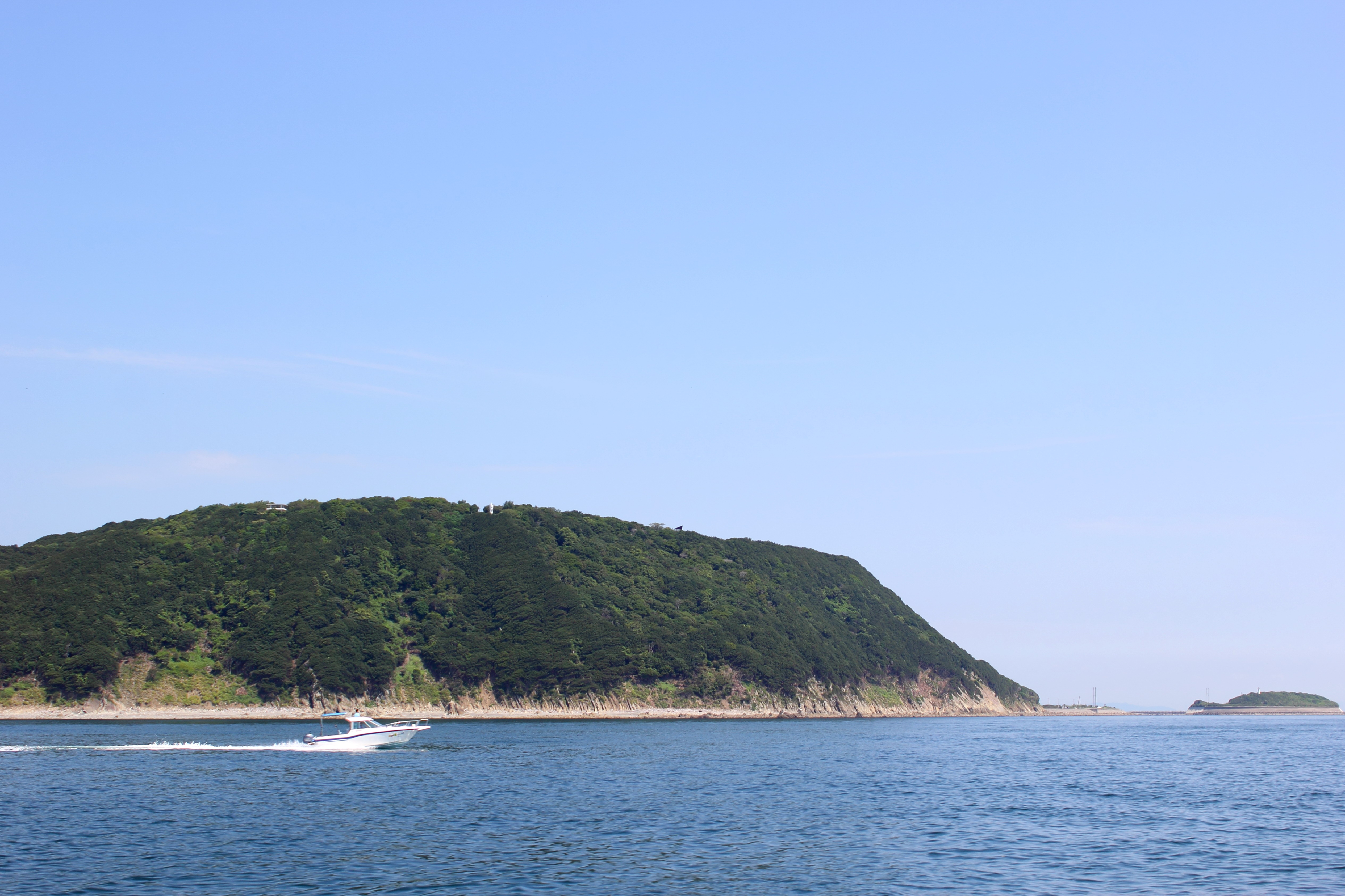 生石鼻（岬）を海上より望む 小さく生石鼻灯台が見える。